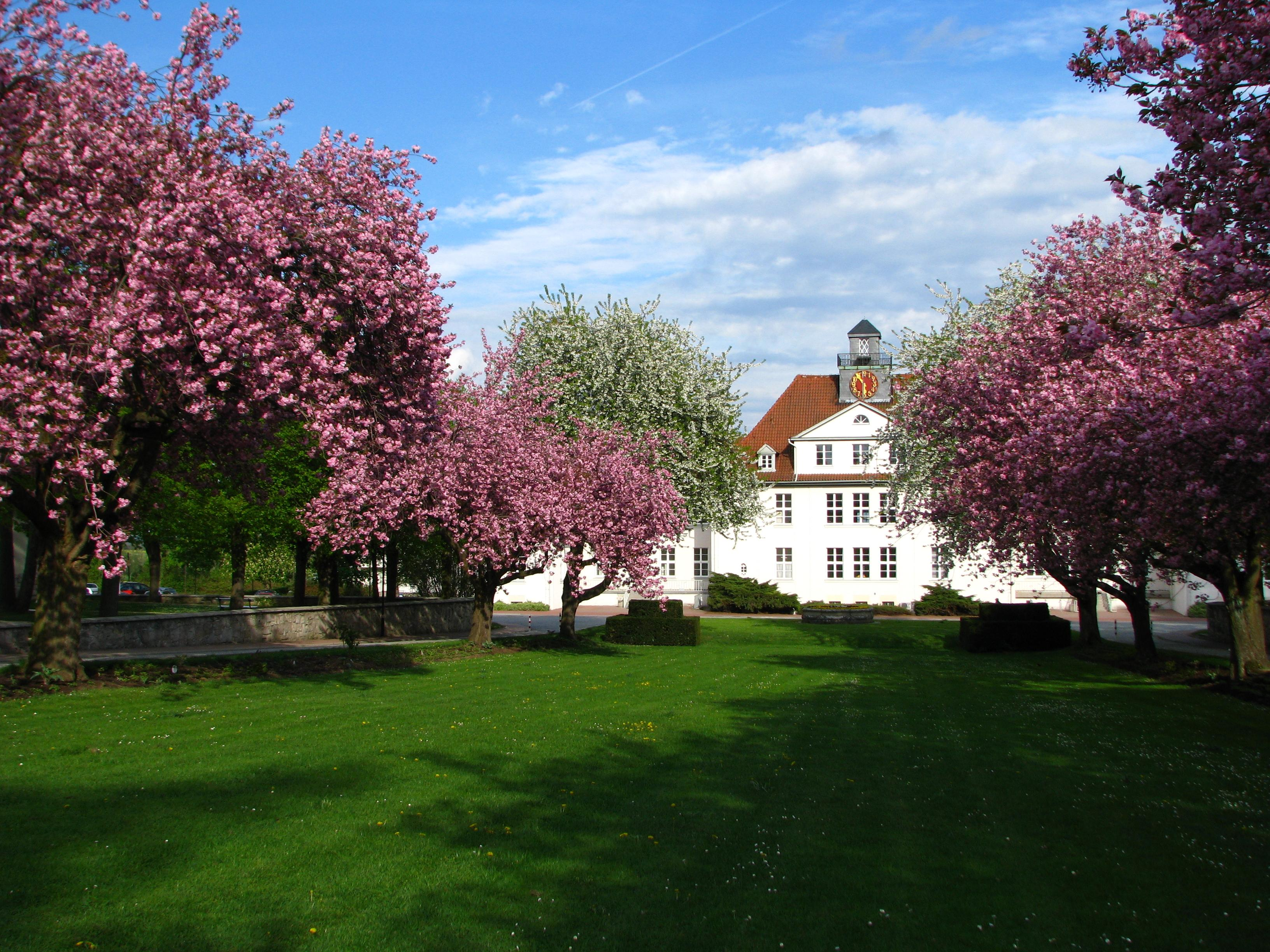 Kirschblüte in Pfafferode bei Mühlhausen (Thüringen).